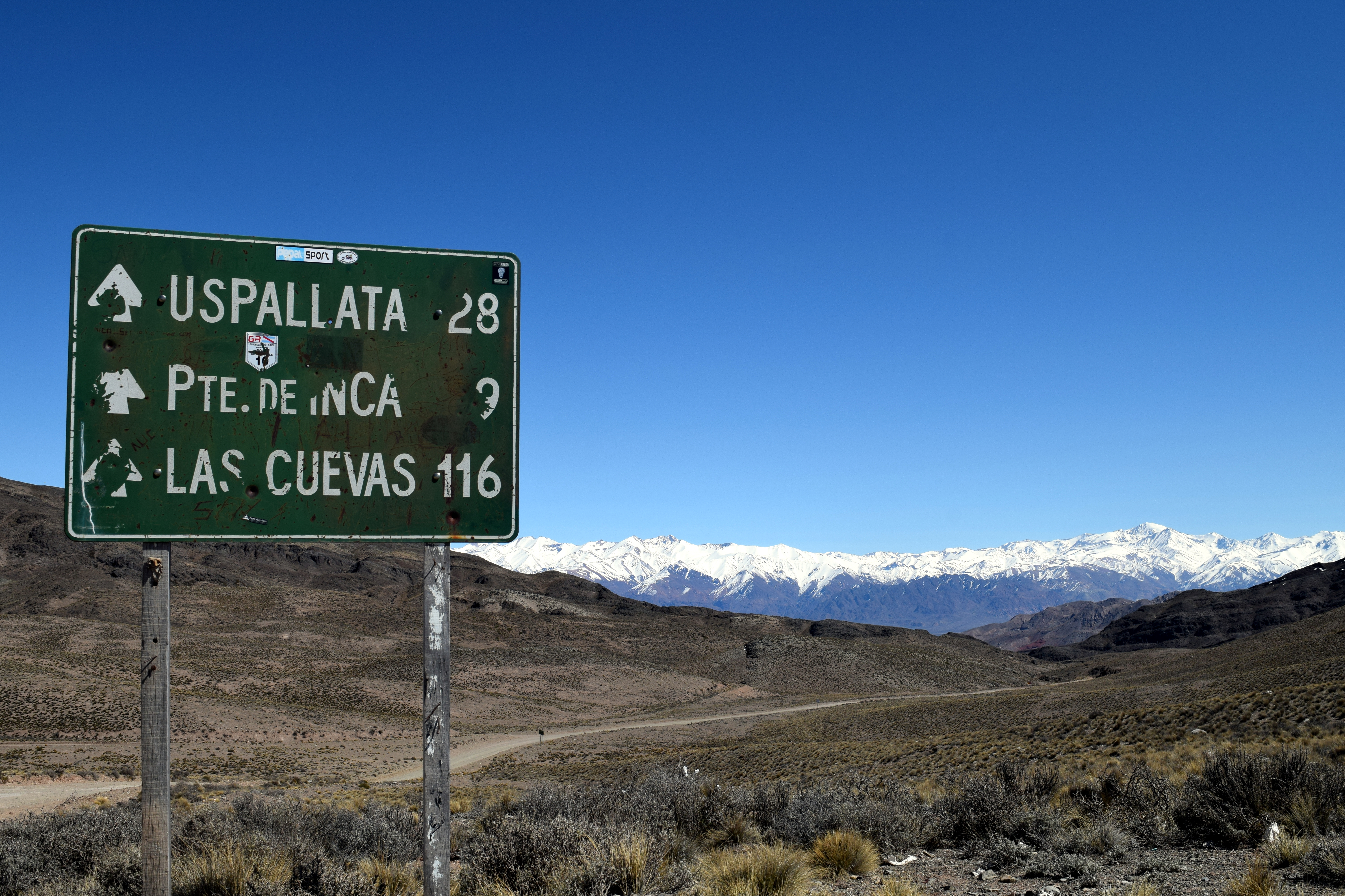 La Ruta Provincial 52 en la provincia de Mendoza, Argentina.